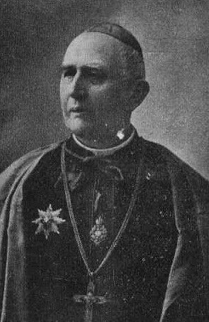 František Xaver Brusák (1840 - 1918), Český římskokatolický kněz.